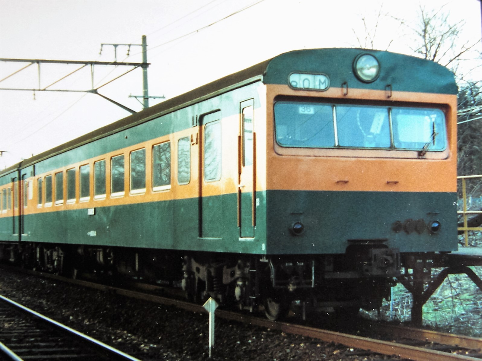 国鉄80系電車クハ85104